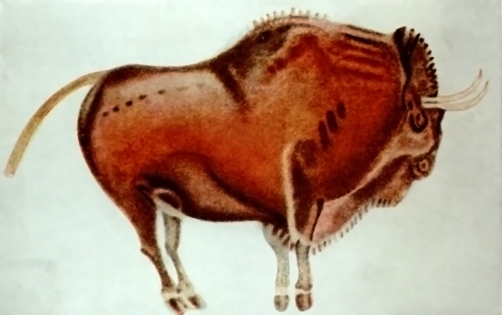 Calco de uno de los bisontes del panel de los bisontes en la Cueva de Altamira (Cantabria, España)